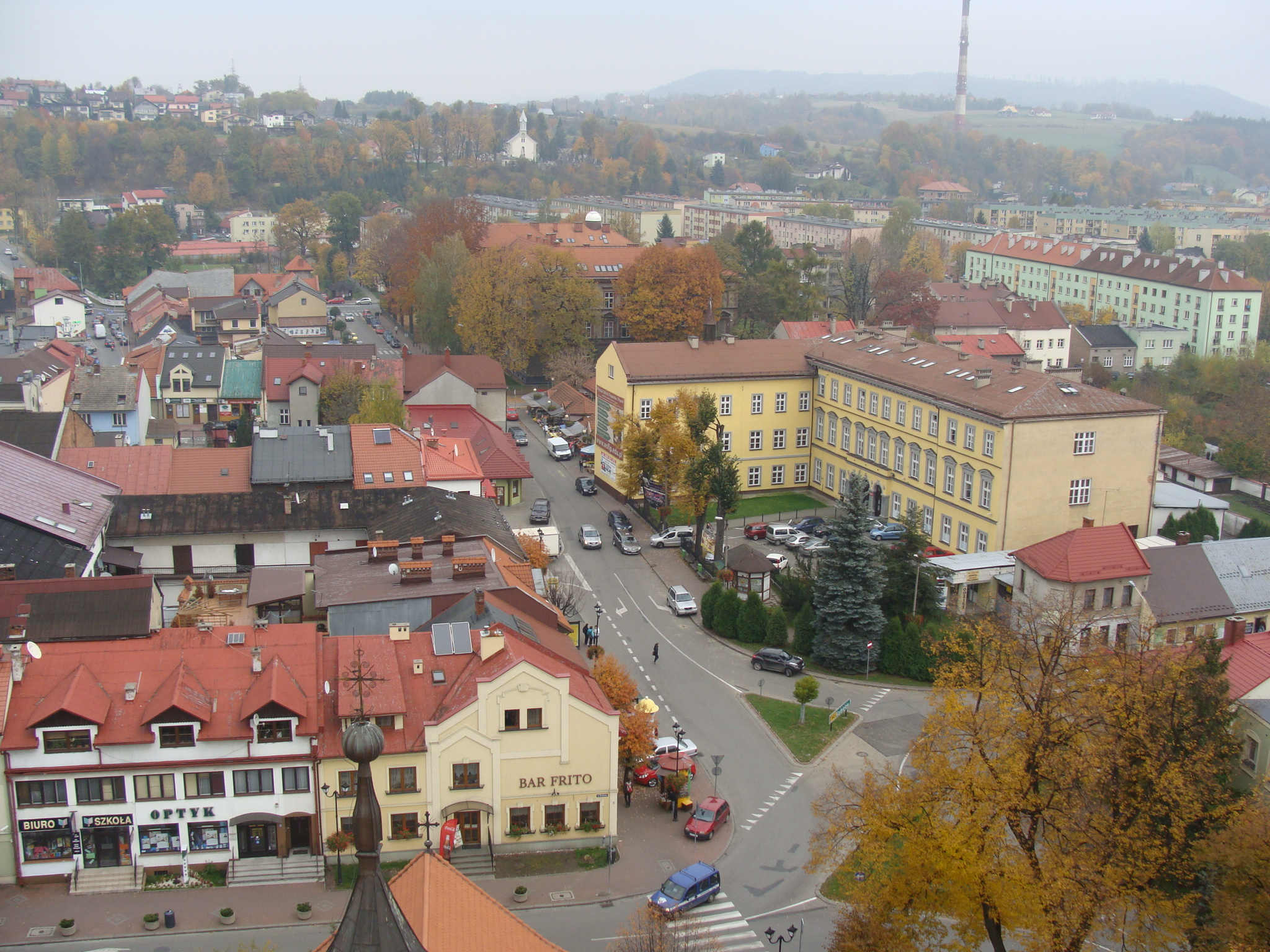 Plac Mariacki w Żywcu - widoczny Zespół Szkół Ekonomiczno-Gastronomicznych (po prawej), październik 2012. Widok z wieży konkatedry.